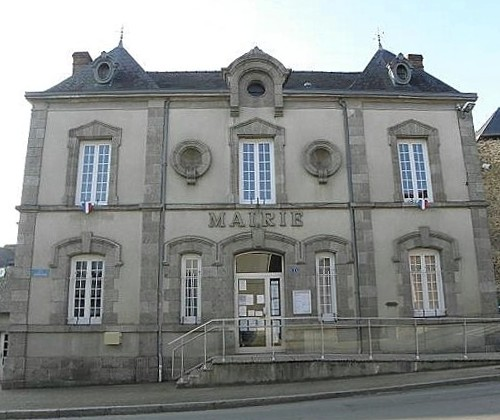 Mairie de Gaël (35).